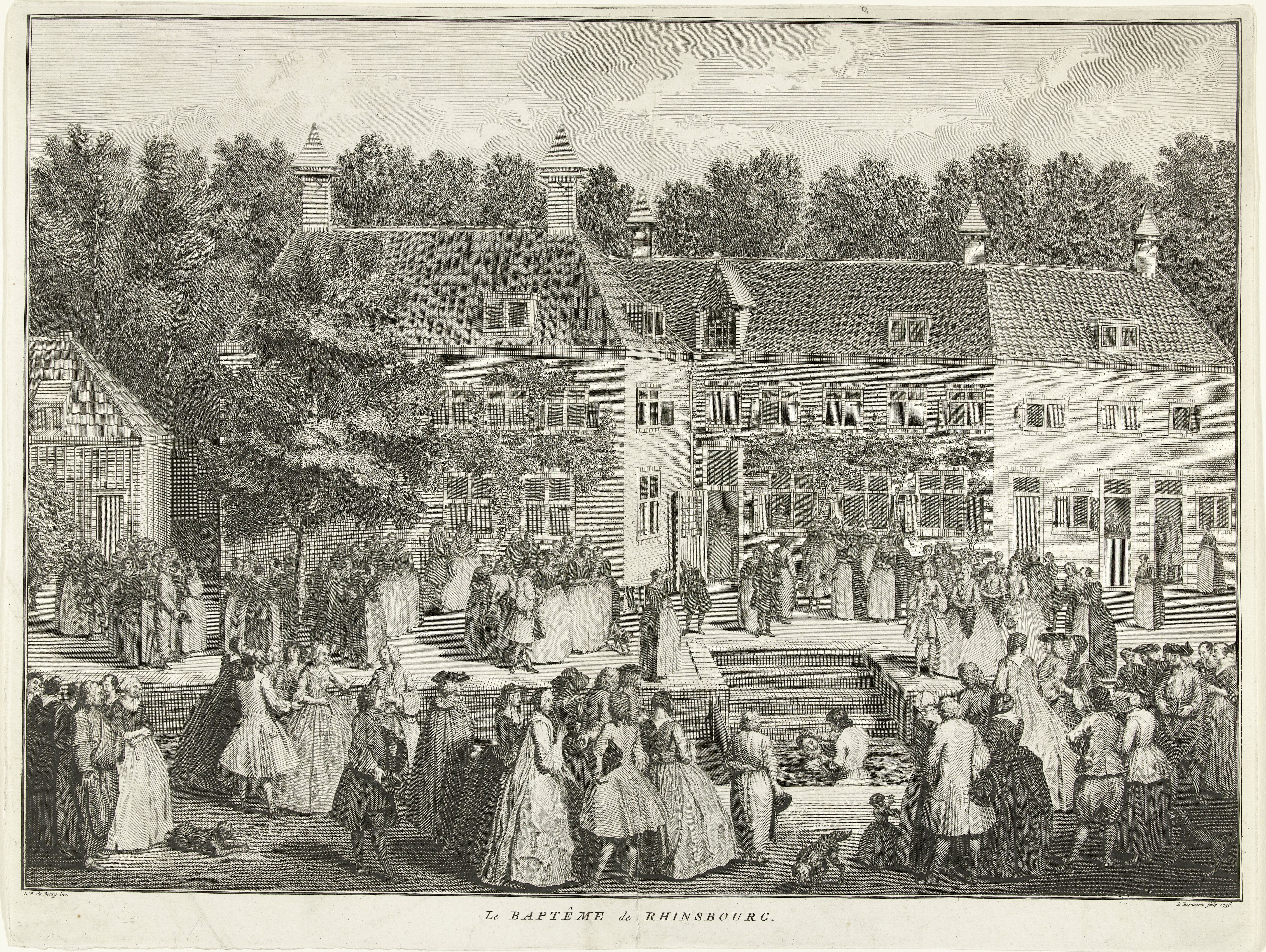 Identificatie Titel(s) - Doop bij de Rijnsburgse Collegianten, ca. 1735 / Le Baptême de Rhinsbourg (titel op object) Objecttype - prent Objectnummer - RP-P-OB-84.112 Catalogusreferentie - FMH 3994-Aa Opmerking: (toegevoegd nummer RPK) Opschriften / Merken - verzamelaarsmerk, verso, gestempeld: Lugt 2228 Omschrijving - Doopceremonie bij de Rijnsburgse Collegianten, ca. 1735. Doop door onderdompeling van volwassenen in een gracht om het Groot Huis, bijgewoond door de leden van de gemeente. Vervaardiging Vervaardiger - prentmaker: Balthasar Bernards (vermeld op object) naar ontwerp van: Louis Fabritius Dubourg (vermeld op object) Plaats vervaardiging - Noordelijke Nederlanden Datering - 1736 Materiaal en Techniek Fysieke kenmerken - ets en gravure Materiaal - papier Techniek - etsen / graveren (drukprocedé) Afmetingen - plaatrand: h 320 mm × b 425 mm Toelichting Niet in Frederik Muller; door het RPK toegevoegd nummer. Gebruikt als illustratie in: B. Picart. Ceremonies et coutumes religieuses de tous les peuples du monde. Amsterdam: J.F. Bernard, dl. 6 (1736). Onderwerp Wat - Baptism ~ Protestant service Wanneer - 1720 - 1740 Waar - Rijnsburg Wie - Collegianten Verwerving en rechten Verwerving - onbekend Copyright - Publiek domein